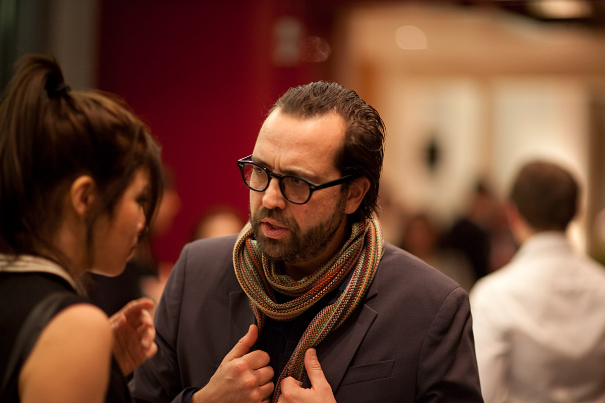 Film-Empfang im Rahmen der Berlinale 2018, Botschaft Berlin